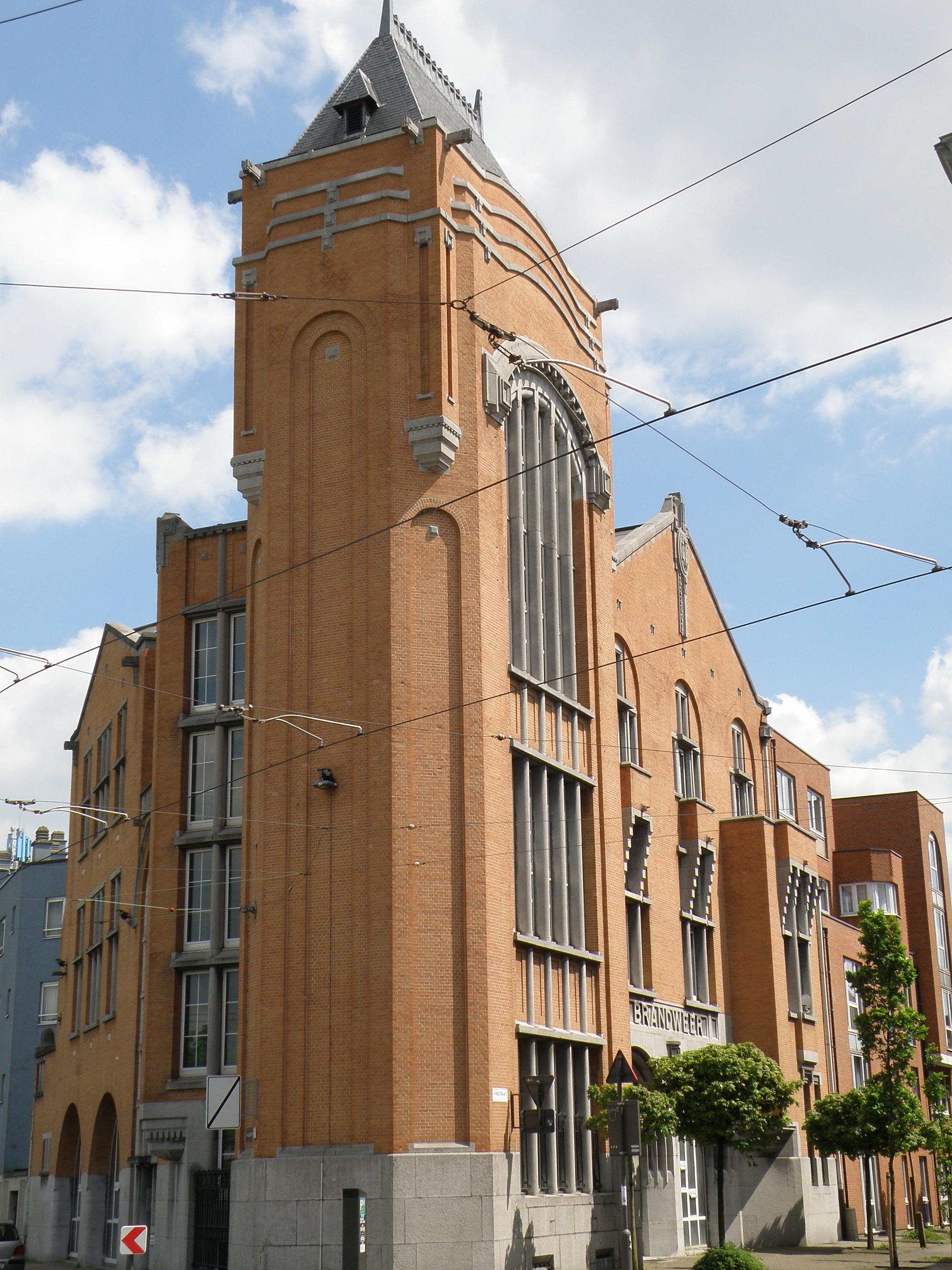 Antwerpen, België. Brandweerkazerne, gelegen aan hoek Halenstraat (links)/Viséstraat (rechts), in de wijk Stuivenberg, anno 1913 gebouwd n.o.v. archit. Emiel van Averbeke.